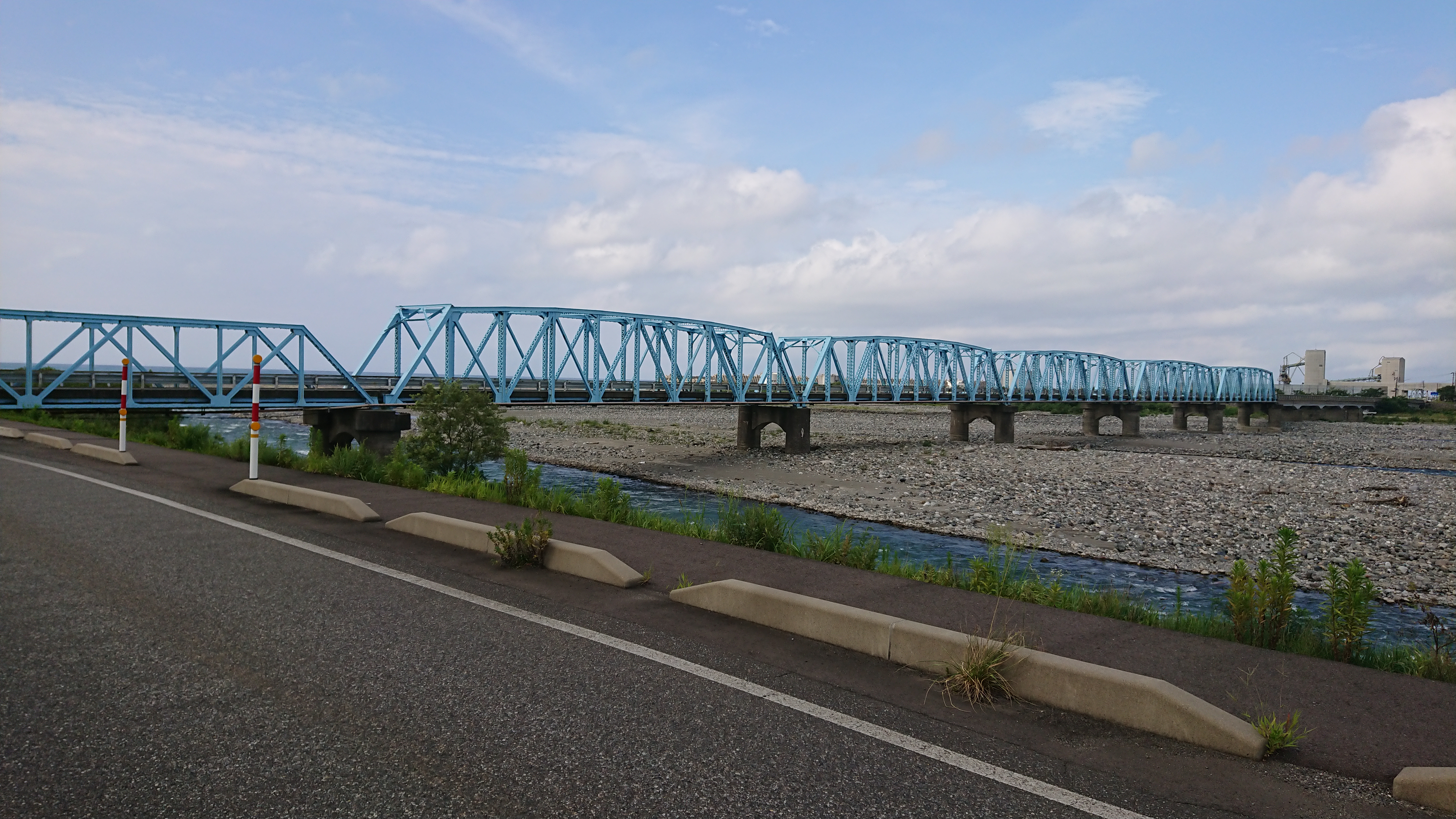 姫川橋を左岸上流堤防より撮影。 新潟県糸魚川市、2020年8月16日。